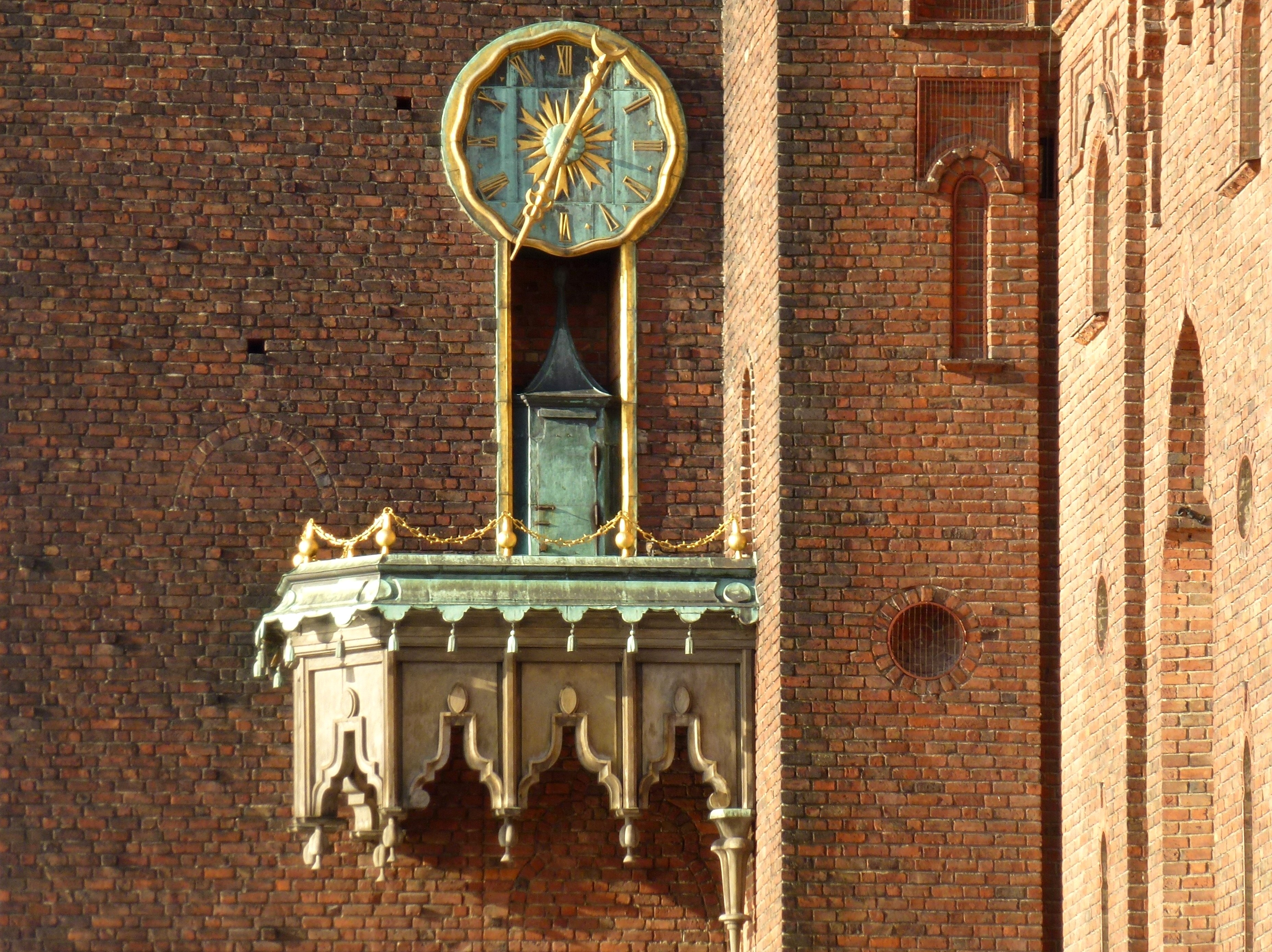 Stockholms stadshus Klockan och Örjanspelet